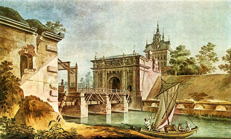 Brama Wyżynna w Gdańsku